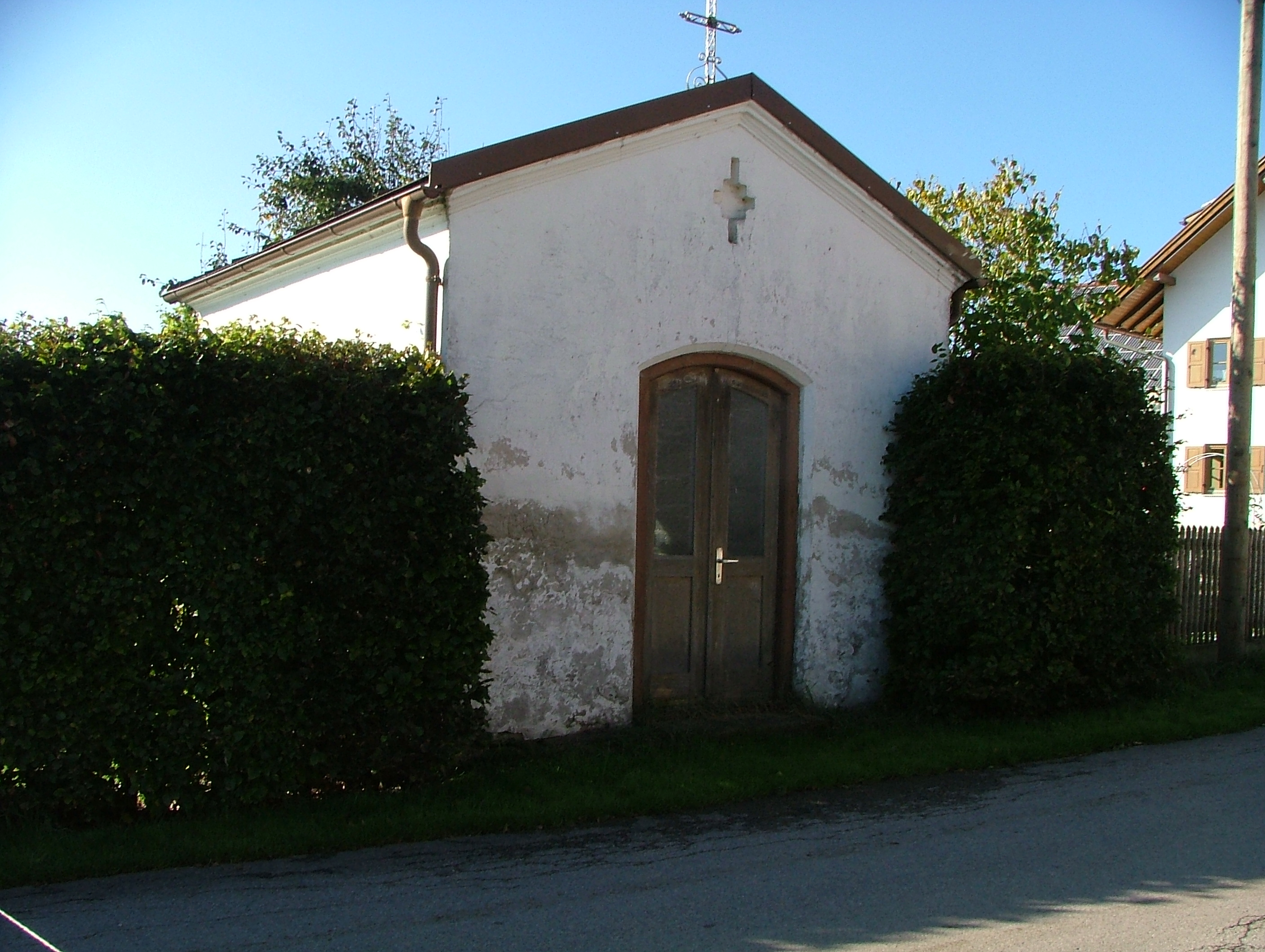 Weilerkapelle